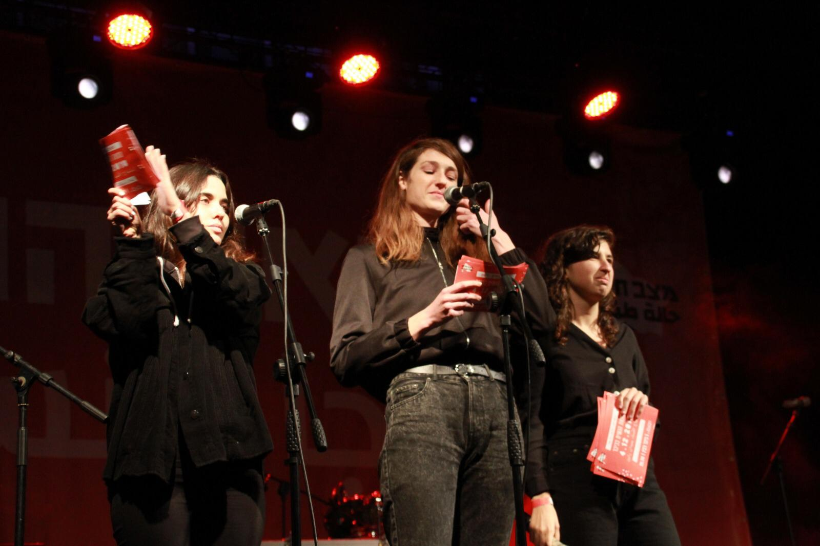 דרור שדות, סתיו ארנון ורותי קליין, יוזמות שביתת הנשים, דצמבר 2018